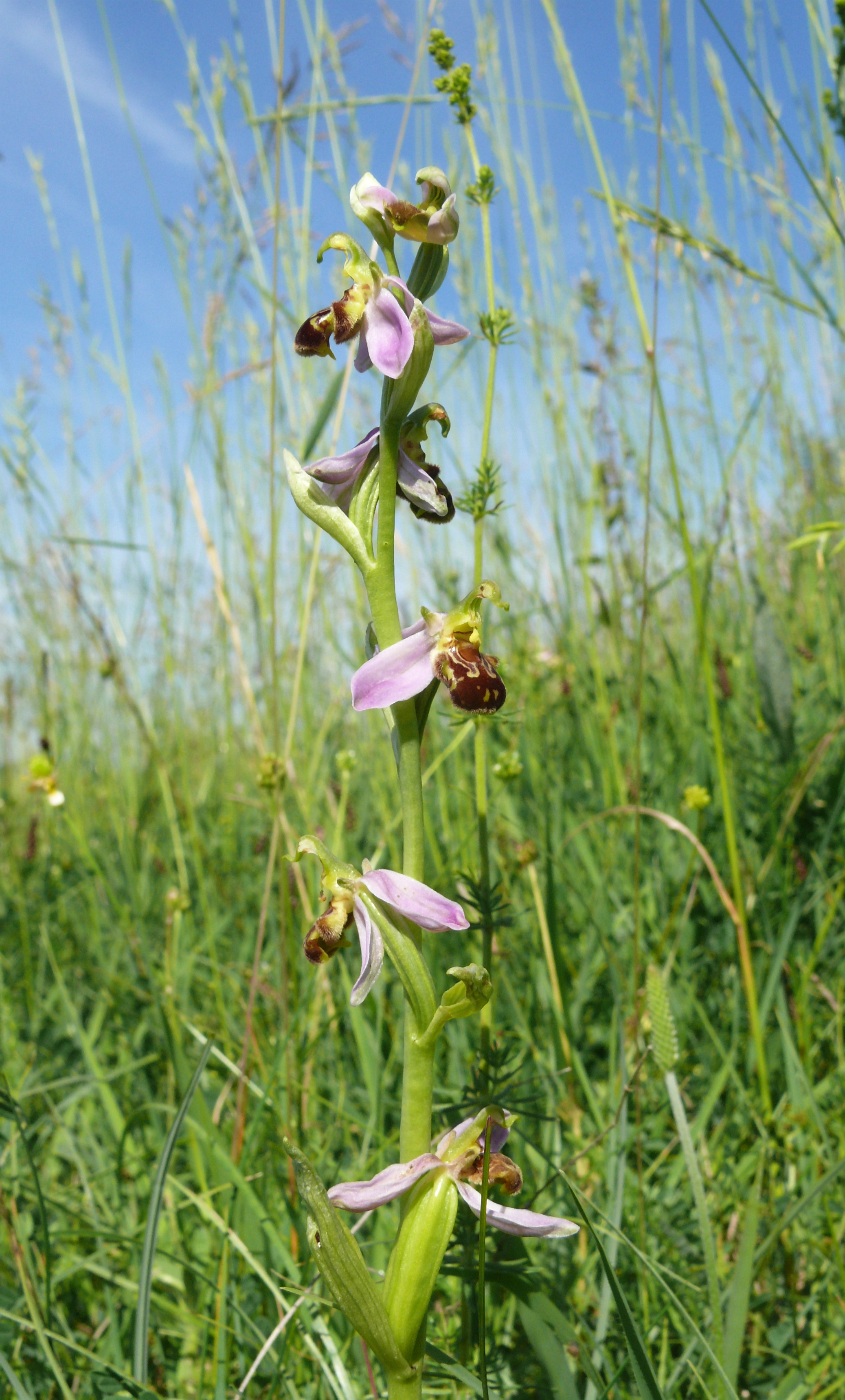 Ophrys apifera, Ostalb, Deutschland